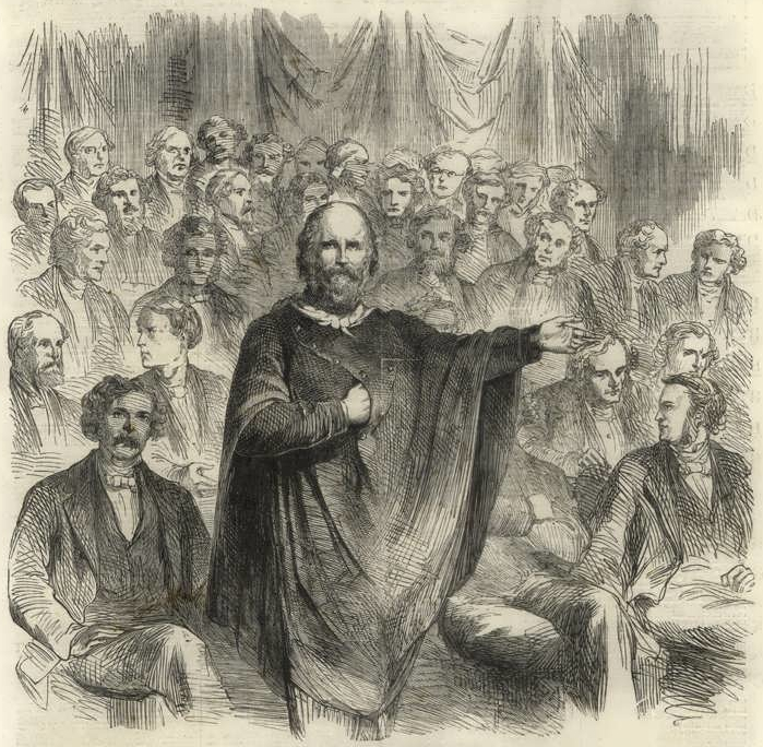 Torino, 18 aprile 1861, prima seduta nel neocostituito Parlamento Nazionale. Garibaldi pronuncia l'infervorato discorso contro il governo di Cavour per l'irriconoscente trattamento riservato all'Esercito Meridionale.